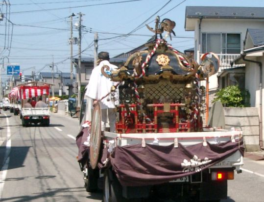 土崎神明社祭の曳山行事の写真